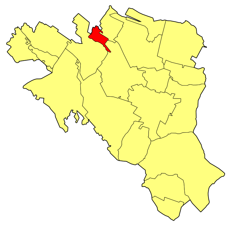 Położenie sołectwa Kozły w gminie Ostrzeszów.